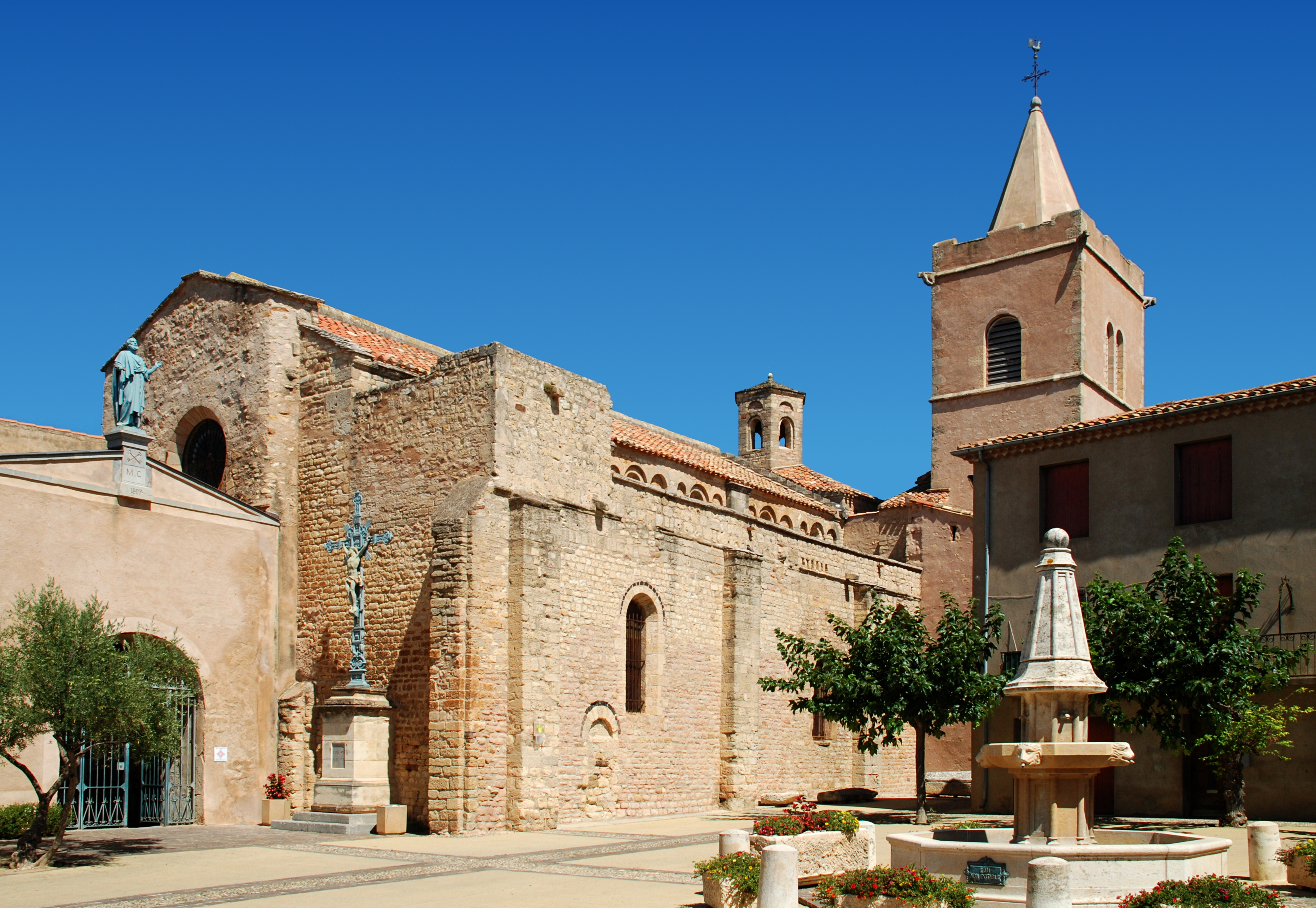 France - Languedoc - Hérault - Église Sainte-Marie de Quarante .